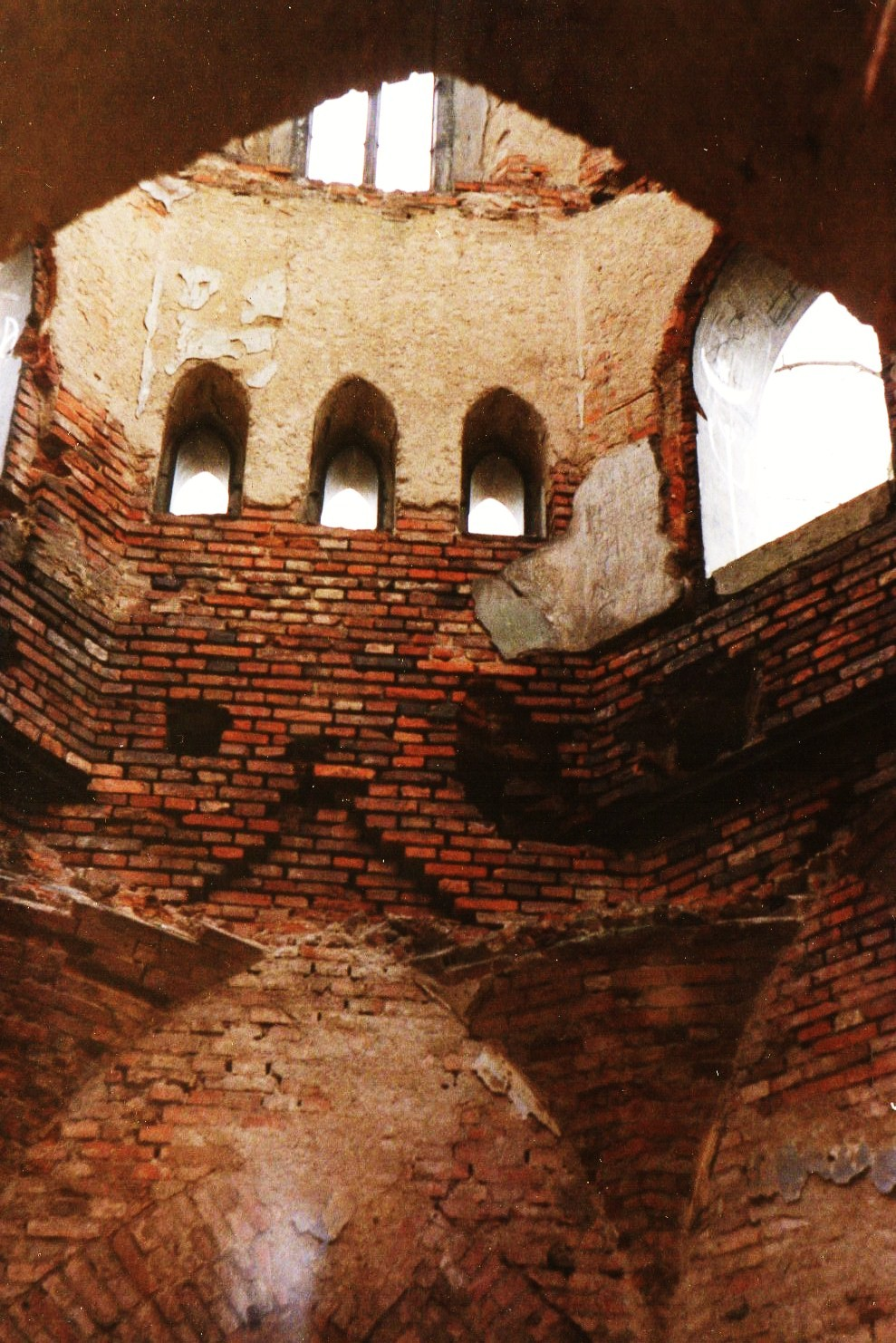 Mauzoleum Bierbaumów w Szreniawie 27 grudnia 1993r.